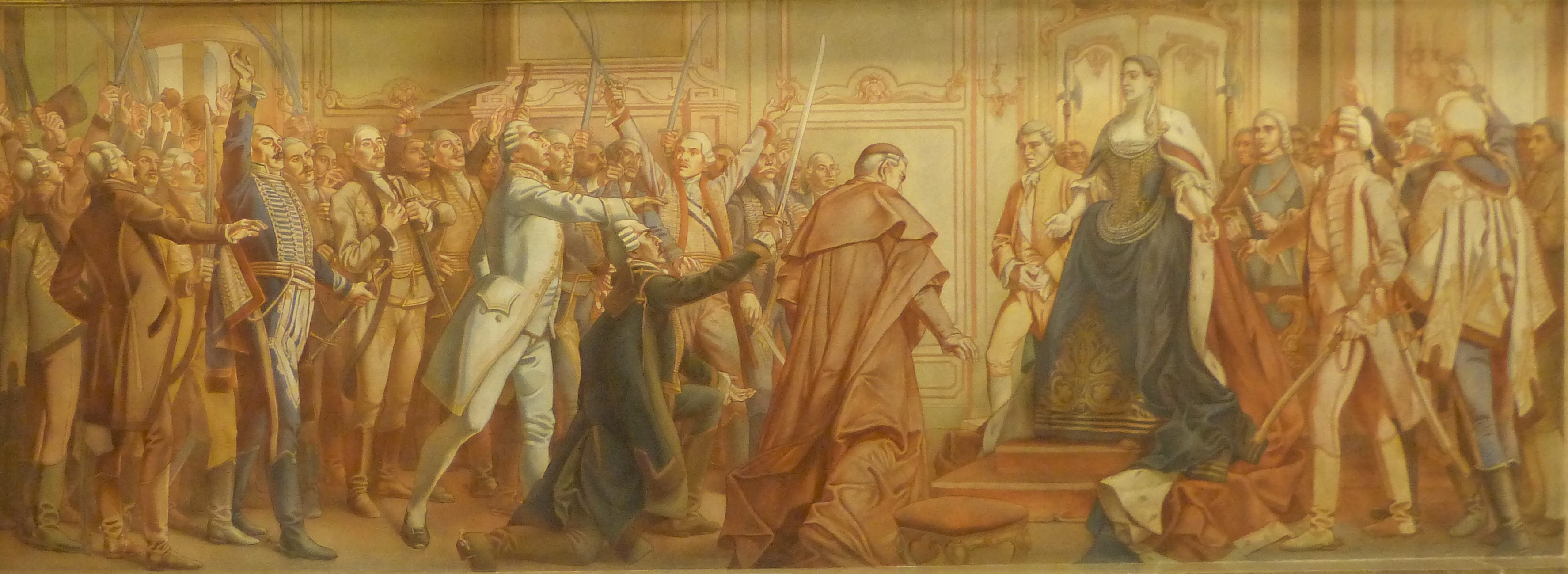 A főrendiházi üléstermében, a pulpitustól jobbra. Jantyik Mátyás festménye - Mária Terézia a pozsonyi országgyűlésen. 1901. Mária Terézia 1741. szeptember 11-én fekete gyászruhában jelent meg a pozsonyi országgyűlésen. A magyar rendek felajánlották segítségüket. trónjának megvédéséhez. Forrás